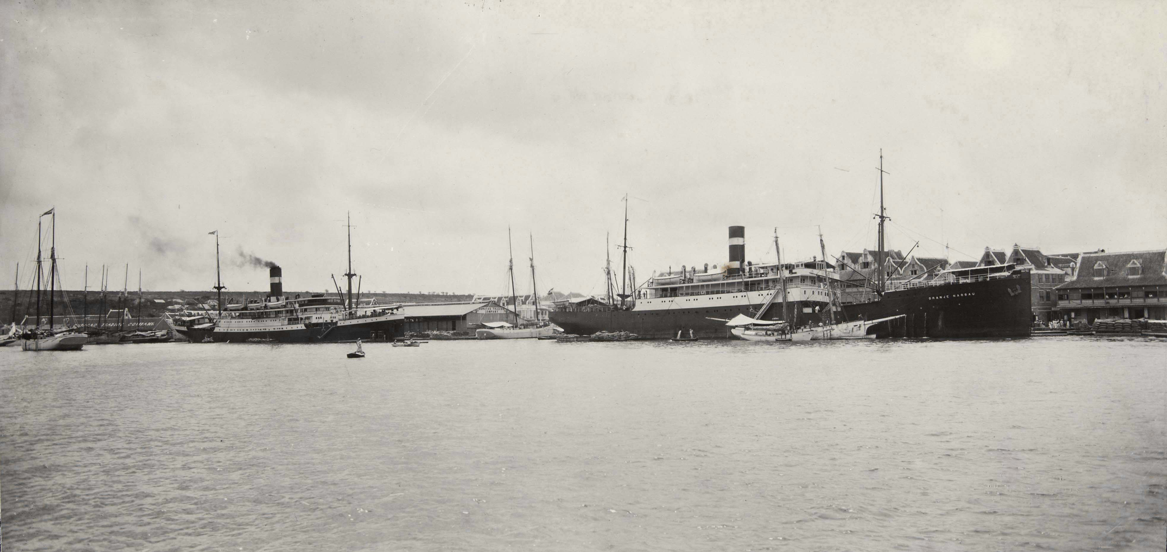 Panoramafoto.